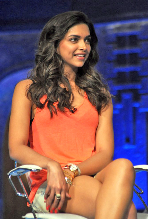 Deepika Padukone promotes 'Cocktail' on DLF IPL's Extraaa Innings